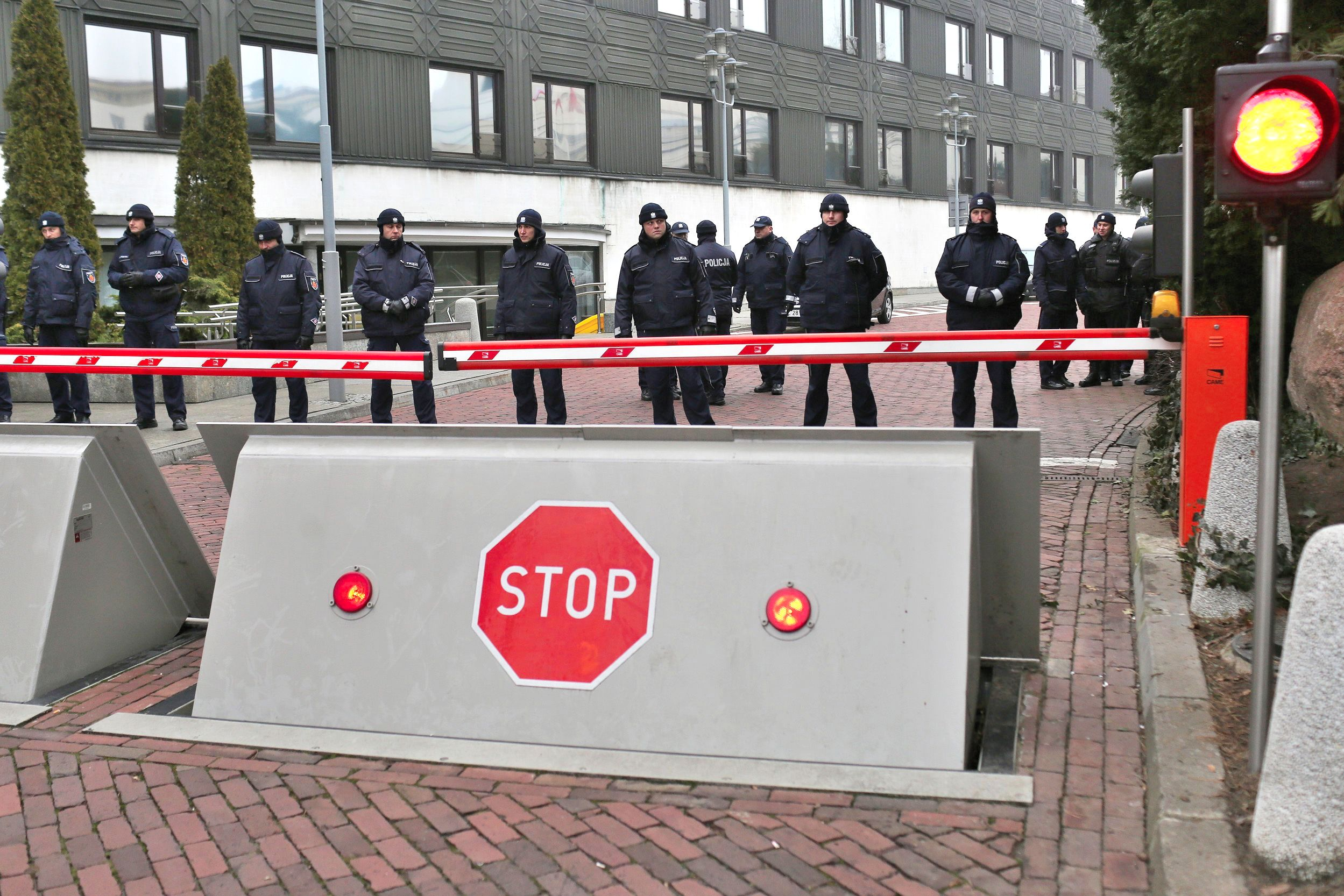 Kryzys sejmowy, policja przy wjeździe na teren kompleksu Sejmu przy budynku H.